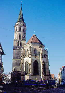 Die Stadtkirche in Schorndorf, Ansicht von Osten